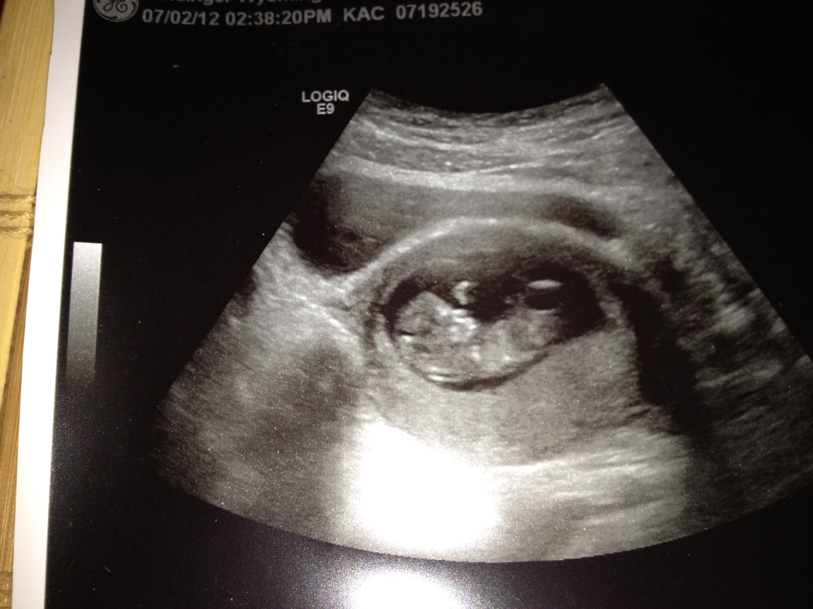 LIFE